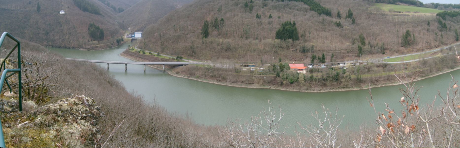 D'Biwelsser Millen. Lénks d'Bréck tëschend Biwels a Veianen, derhanner déi 10. Maschin vum Pompelspäicherwierk a lénks driwwer am Hang d'Veianer Bildchen.